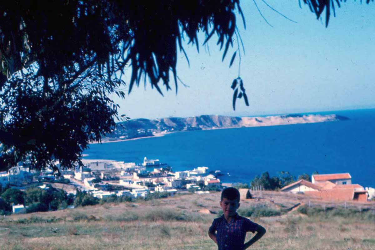 Le cap Gammarth et la dune vus de Sidi Driff